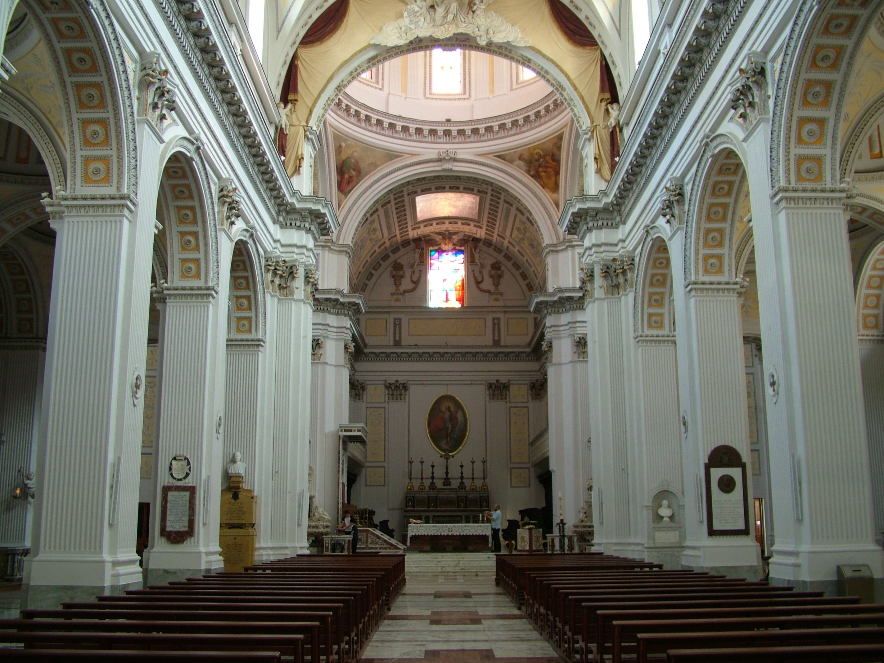 Sizilien, Caltagirone, die Kathedrale Innen